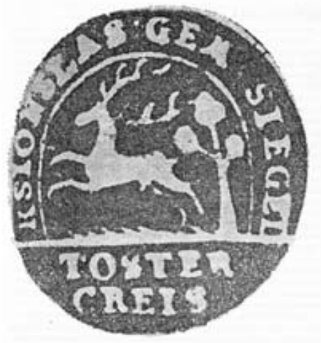 Altes Siegel der Gemeinde Xiondslas (Ksionslas)